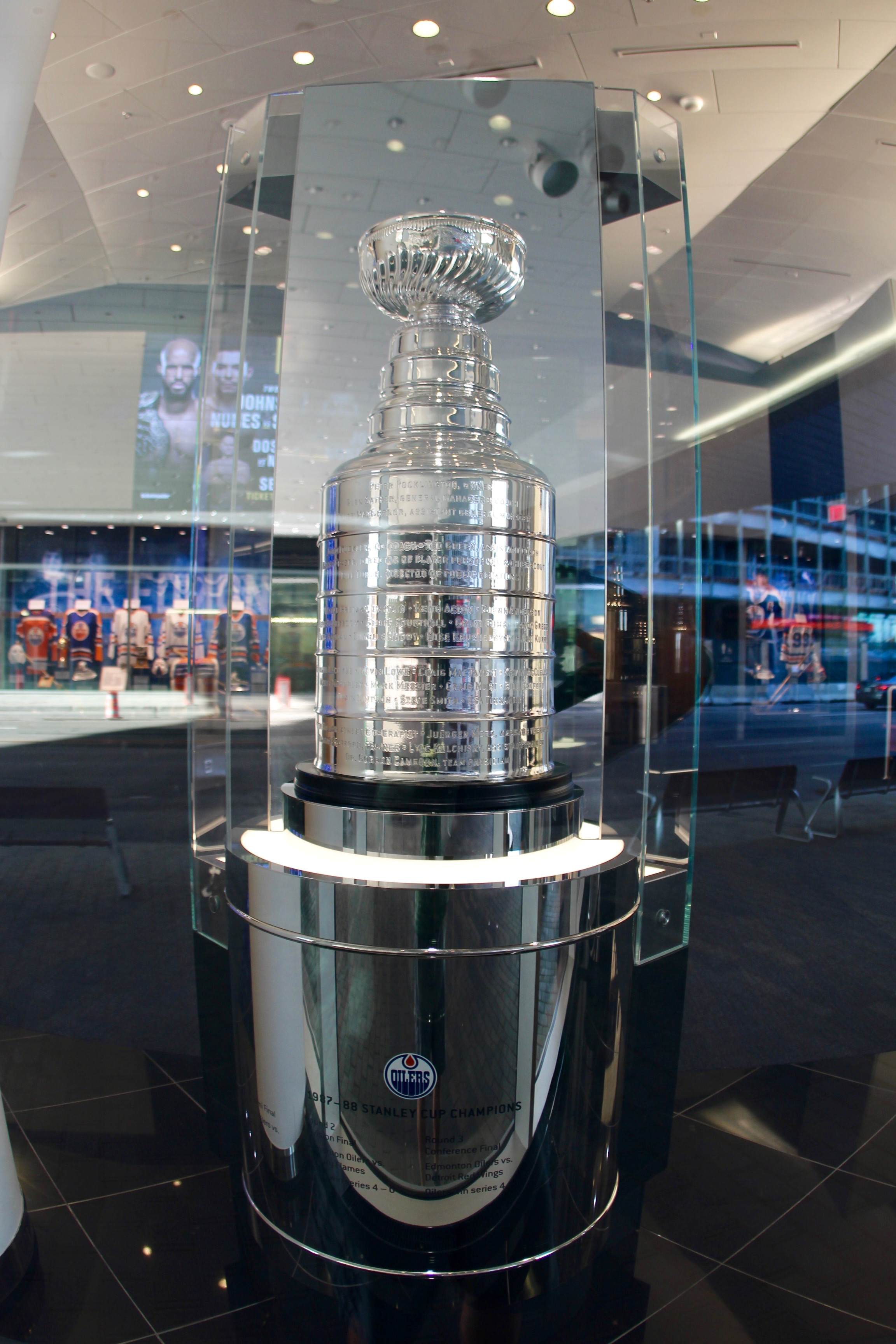 Rogers Place @ Edmonton, Alberta, Canada